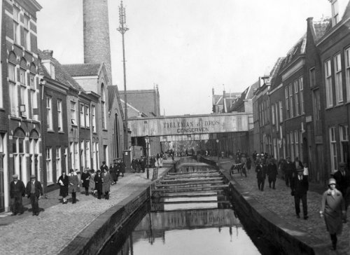 De conservenfabriek van Tieleman & Dros aan de Middelste Gracht te Leiden gaat uit, oktober 1929. Personeel passeert de luchtbruggen van de fabriek over de Leidse gracht. 1 oktober 1929, Leiden, Fotograaf onbekend.